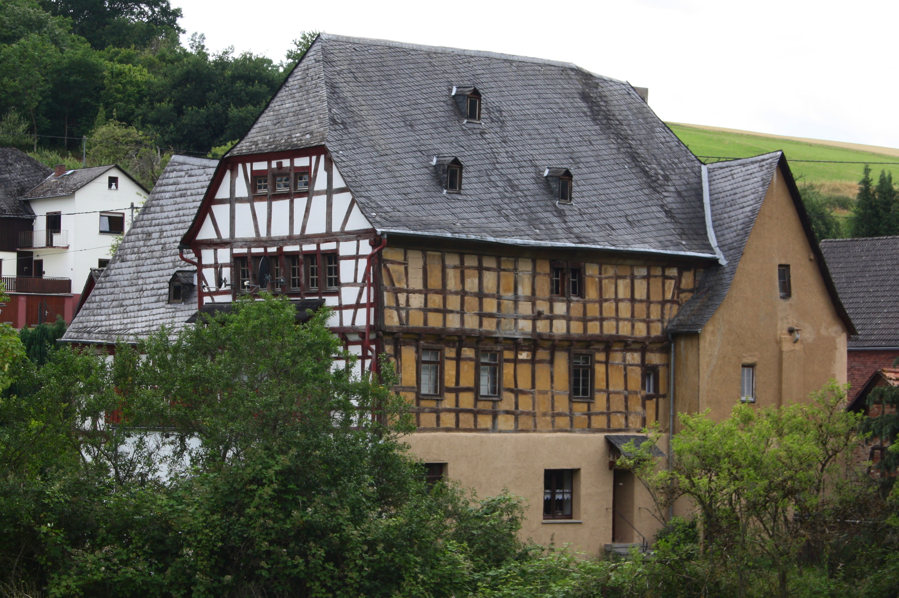 Alte Burg, Kulturdenkmal in Aull, Rhein-Lahn-Kreis, Rheinland-Pfalz, Deutschland